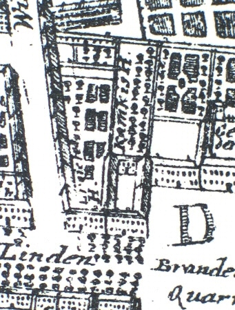 Perspektivische Lageplanzeichnung des Palais Kameke an der Ecke Pariser Platz / Unter den Linden in Berlin im Jahr 1773; im Garten bezeichnet: Kamkis H.(aus).